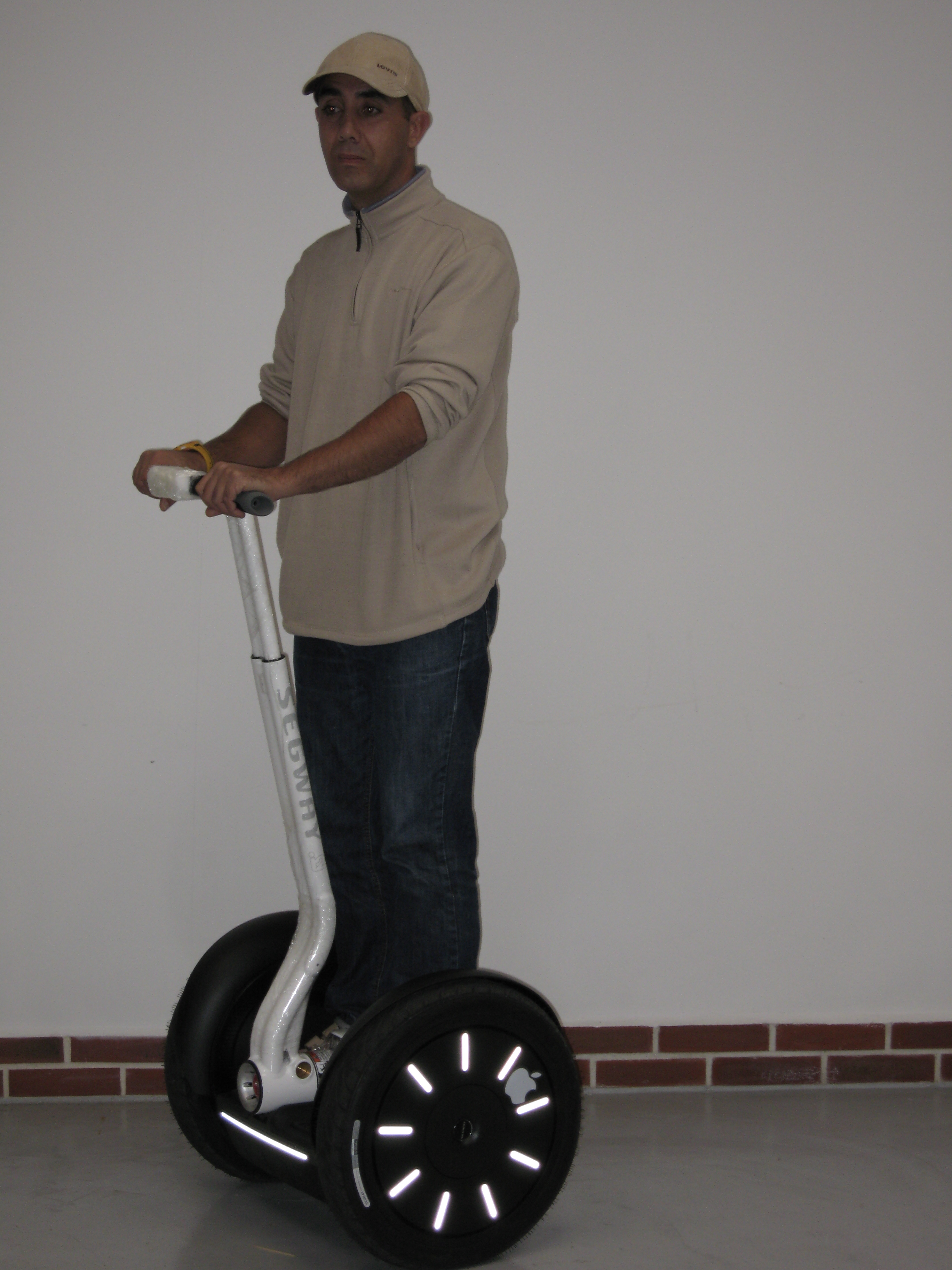 Un Segway à Compiègne